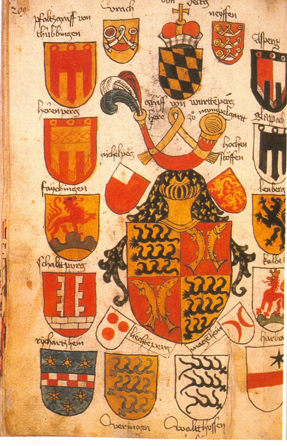 Wappenbuch von Sankt Gallen eingescannt aus: Württemberg und Mömpelgard: 600 Jahre Begegnung. Beiträge zur wissenschaftlichen Tagung vom 17. bis 19. September 1997 im Hauptsaatsarchiv Stuttgart. Herausgegeben von Sönke Lorenz und Peter Rückert. Leinfelden-Echterdingen, 1999, S. 36